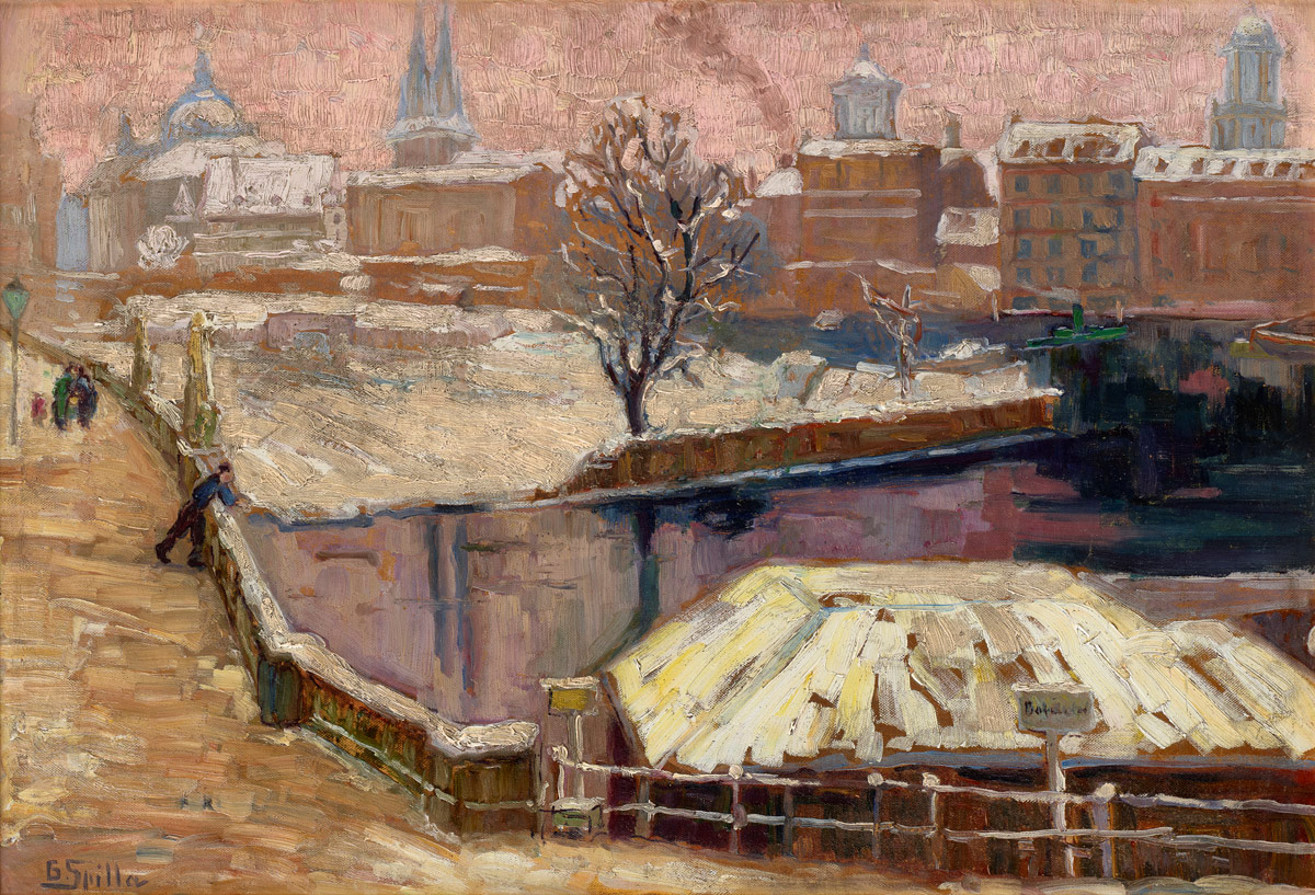 Das Gemälde stellt die Fischerbrücke in Berlin Mitte dar.